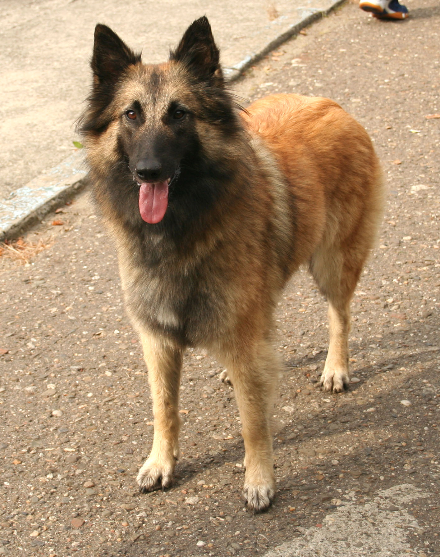 Belgijski_owczarek_terveren na krajowej wystawie w Rybniku - Kamieniu, light coloured female with poor masking